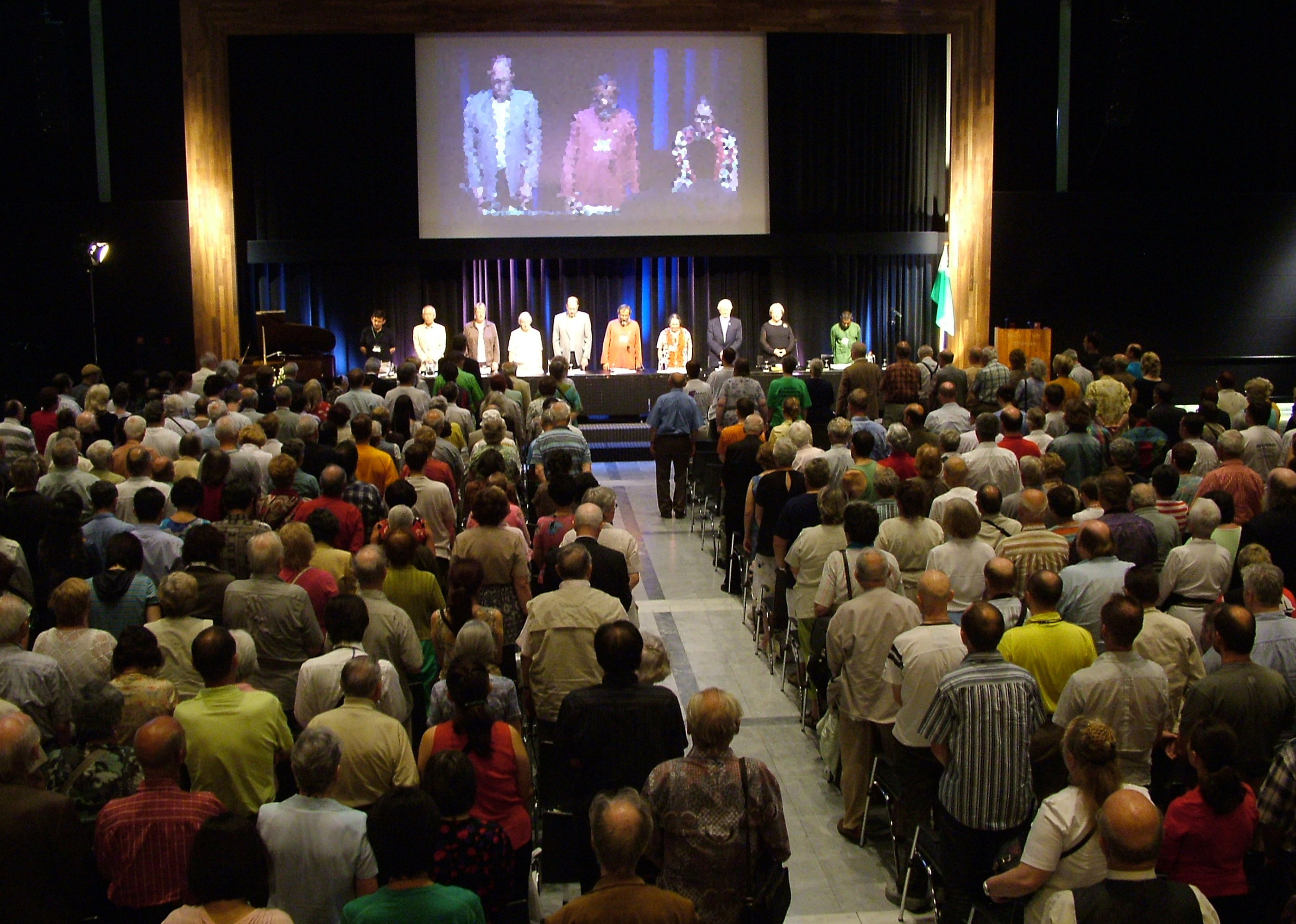 Vzpomínka na zesnulé během zakončení 93. světového kongresu esperanta v Rotterdamu, Nizozemí.